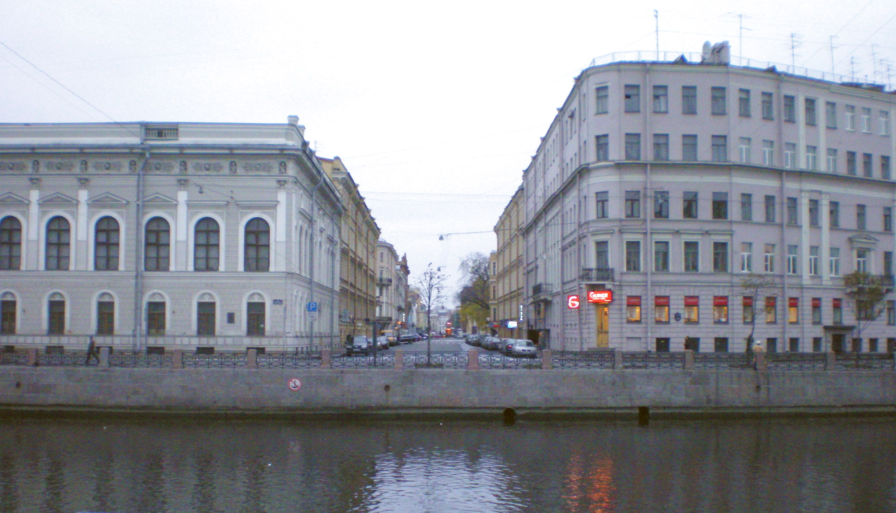 Набережная реки Фонтанки. Вид на Итальянскую улицу